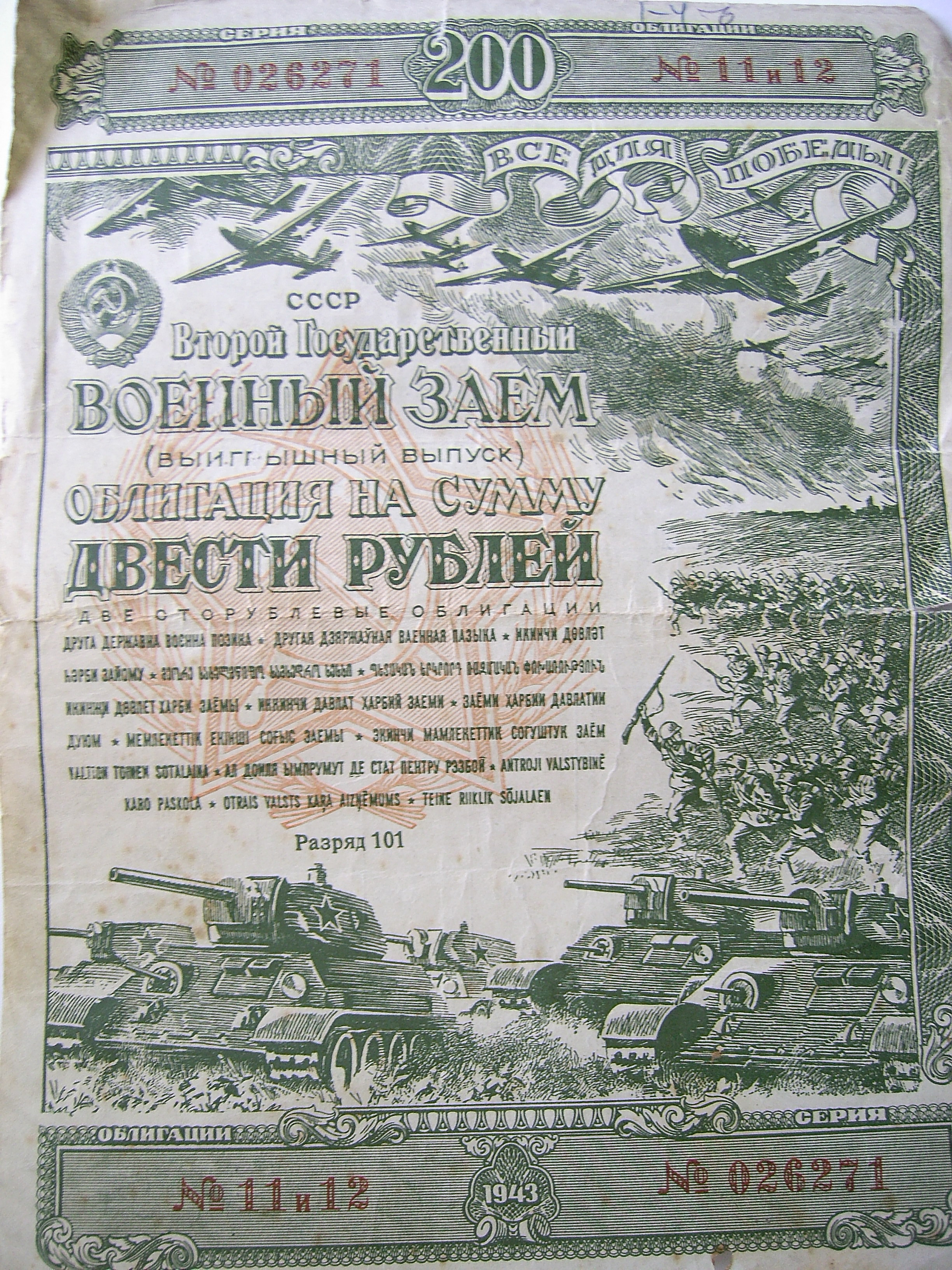 Облигация второго государственного военного займа на 200 руб.